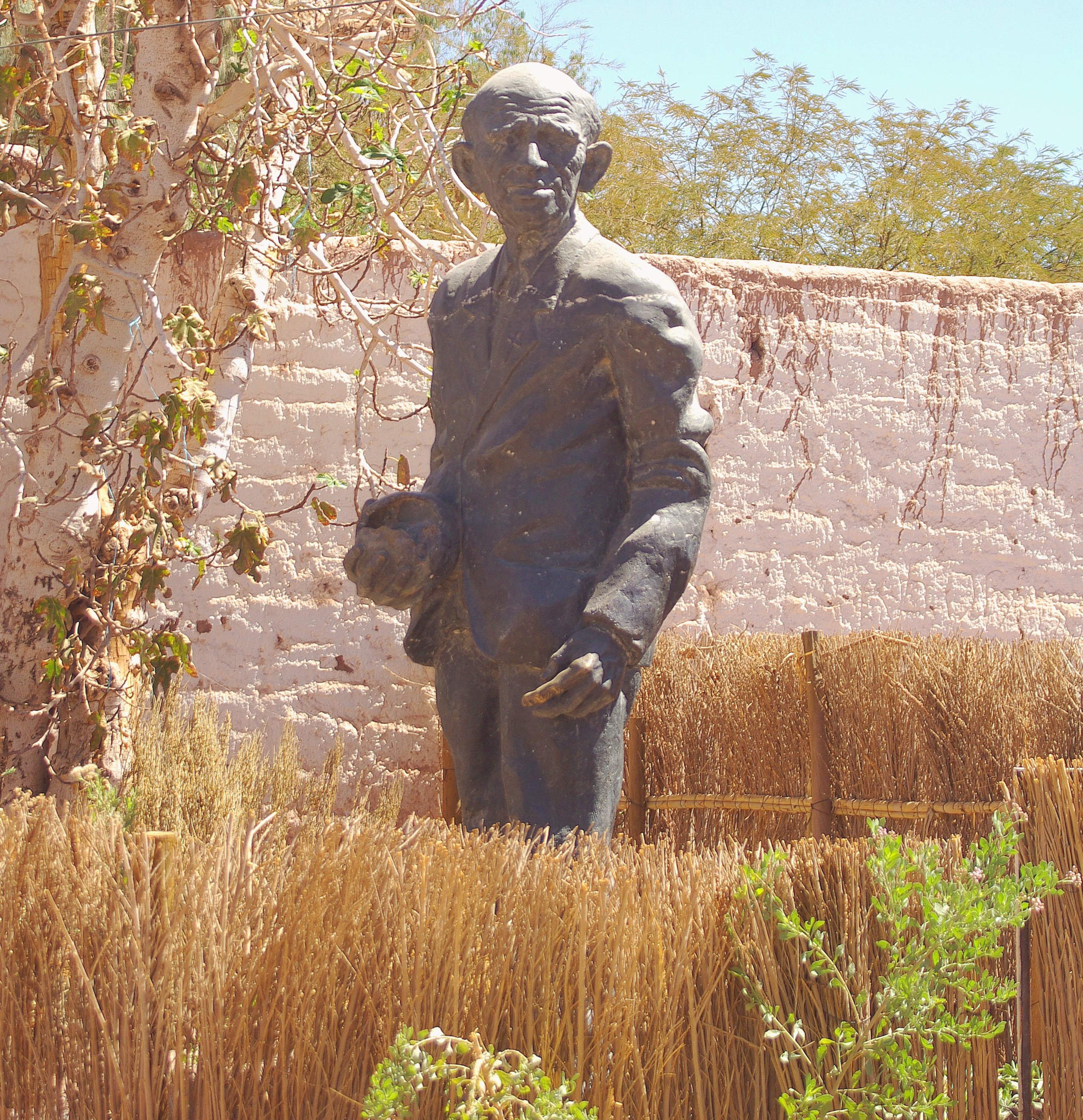 Estatua de Gustavo Le Paige en San Pedro de Atacama, abril de 2010